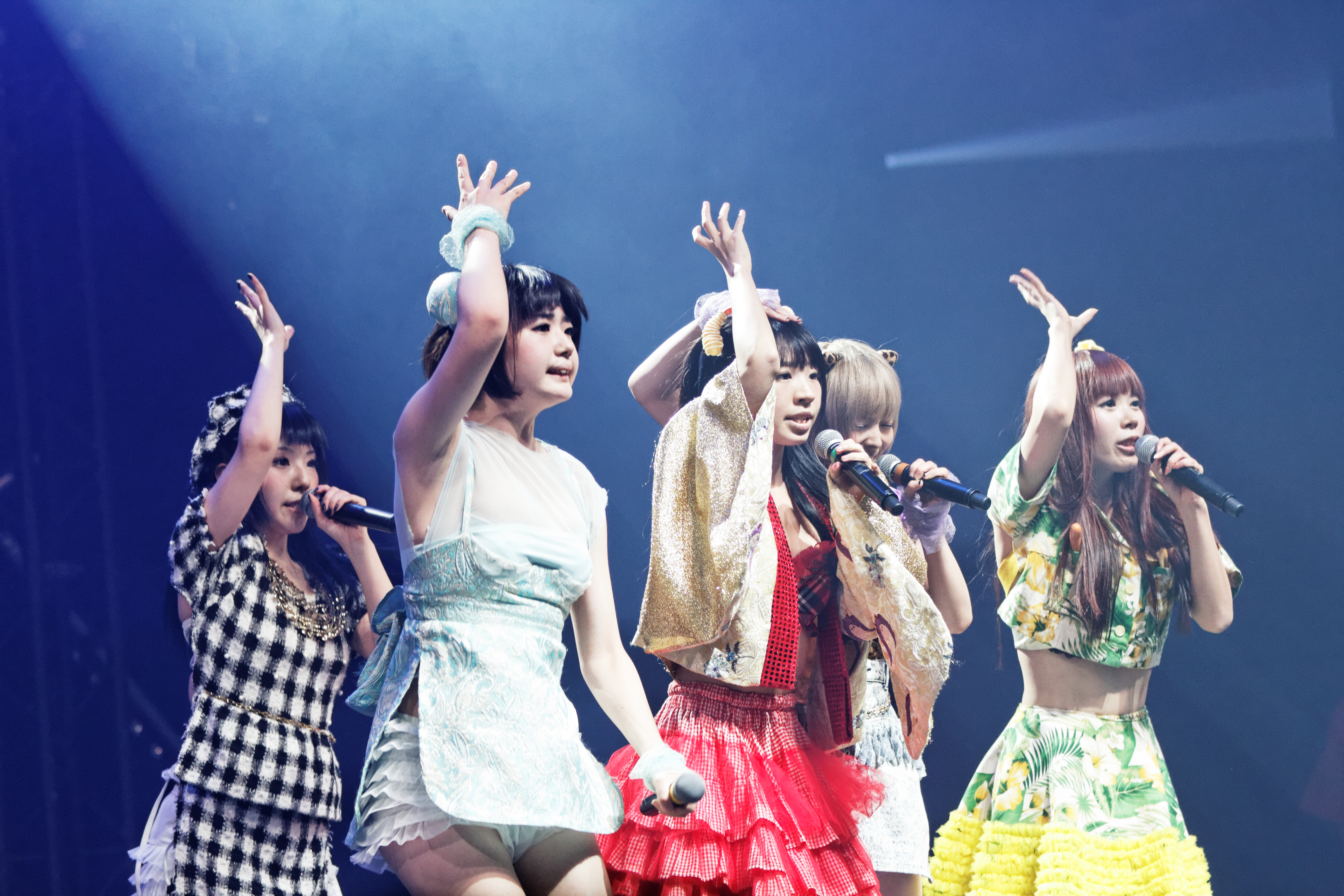 Dempagumi.inc en concert lors du live house du Japan expo Paris 2013.